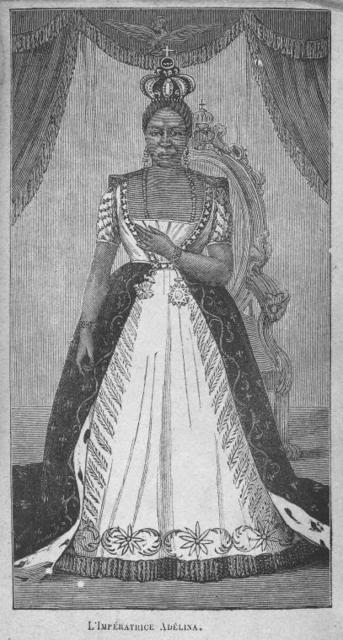 L'impératrice d'Haïti Adélina Soulouque.